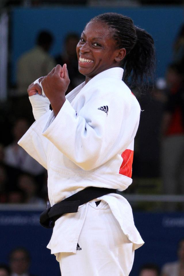 french judoka Gévrise Emane